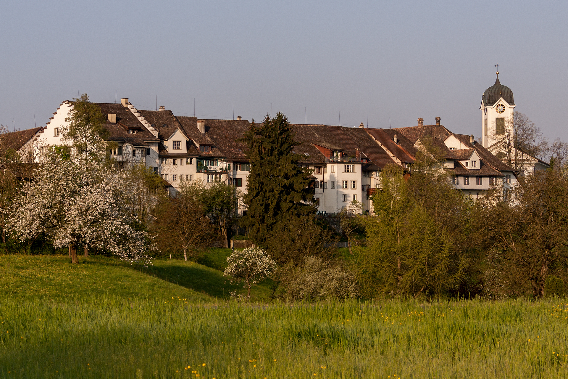 Grüningen (ZH)